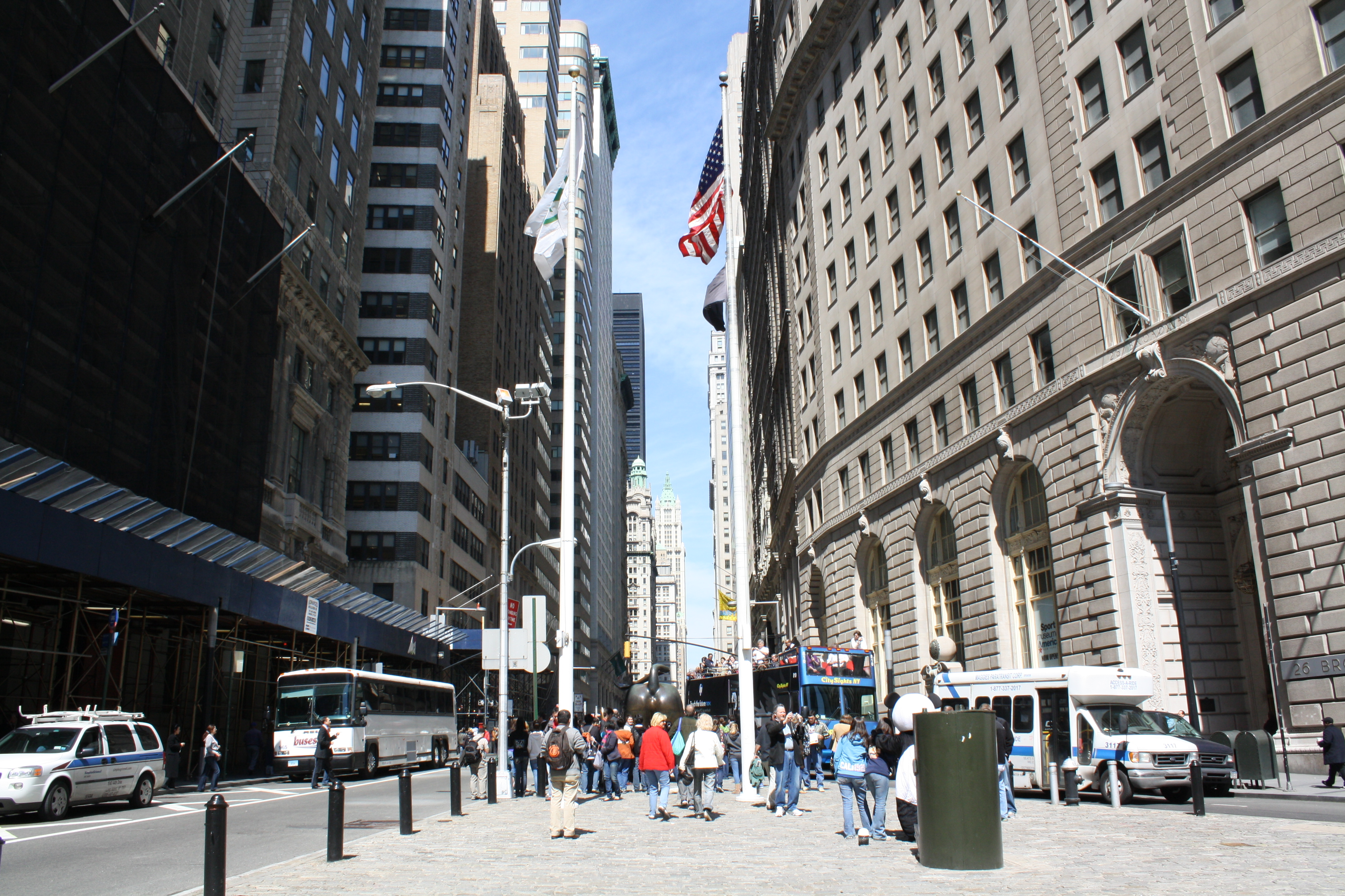 New York City; 2009